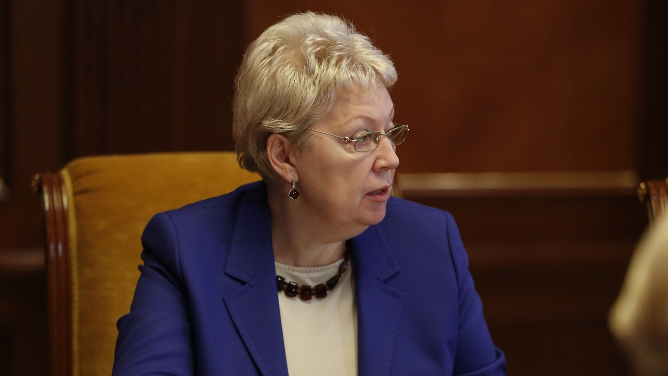 Министр образования РФ О. Ю. Васильева на селекторном совещании о повышении эффективности целевого обучения и целевого приёма, 14 октября 2016 года.